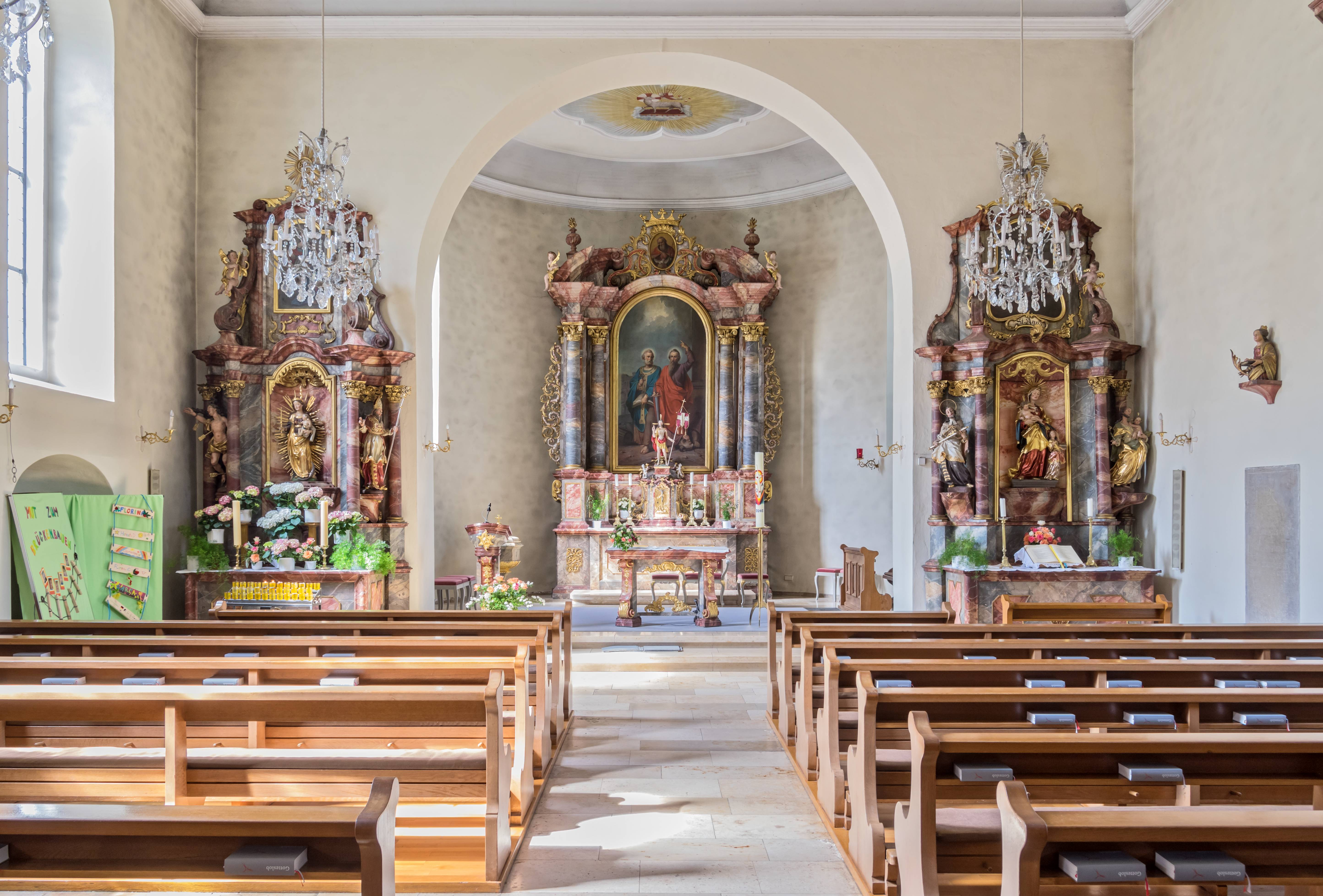 Bilder aus Freiburg von der Kirche St.Peter und Paul in Freiburg Kappel Blick zum Altar